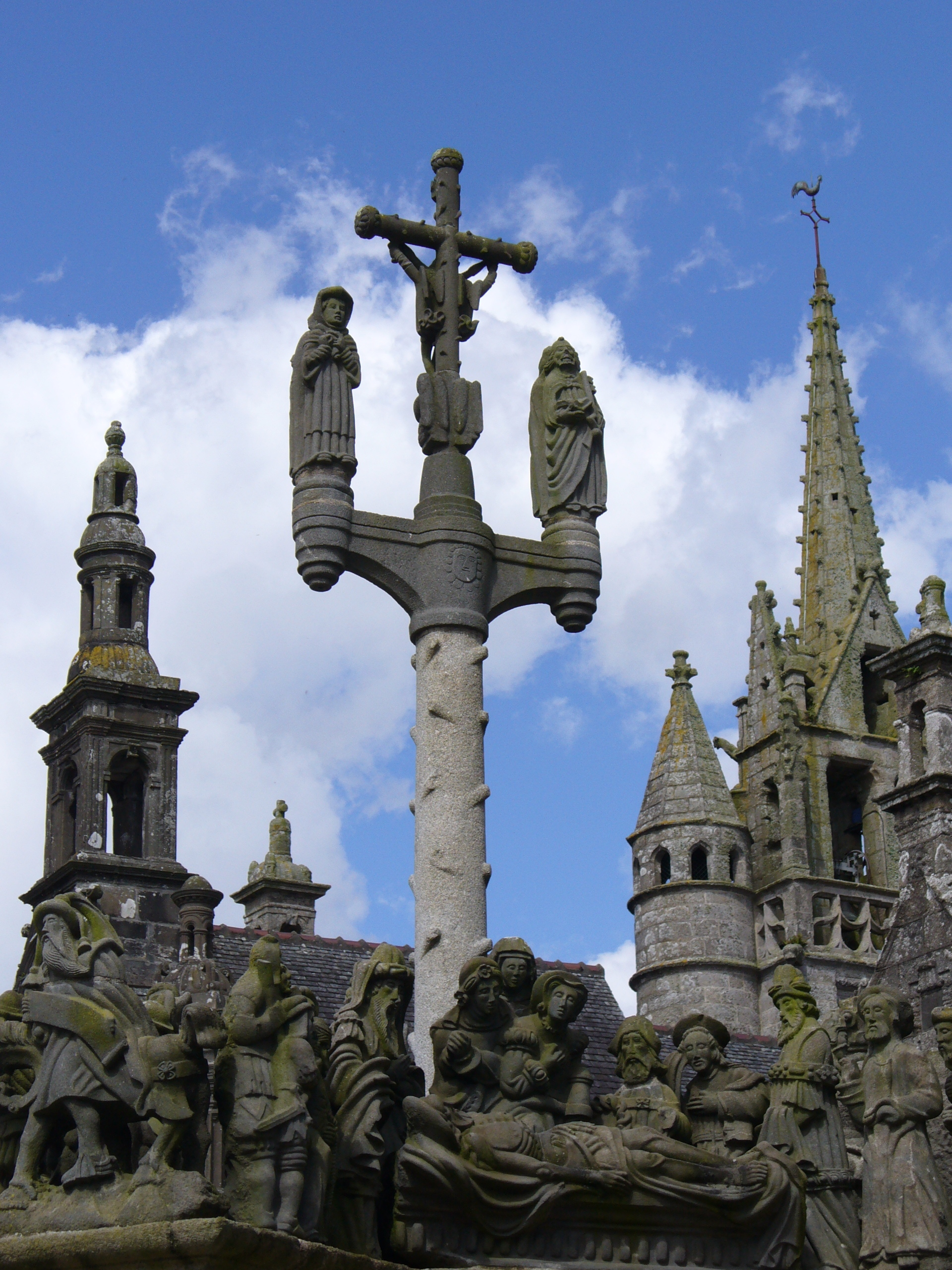 Calvaire-Kalvarienberg von Saint Miliau in Guimiliau zwischen 1581 und 1588 errichtet zeigt mit insgesamt 200 Figuren 17 Passionsszenen im Turm und im Fries 15 Szenen aus dem Leben Jesu-Enclos Paroissal-Umfriedeter Pfarrbezirk